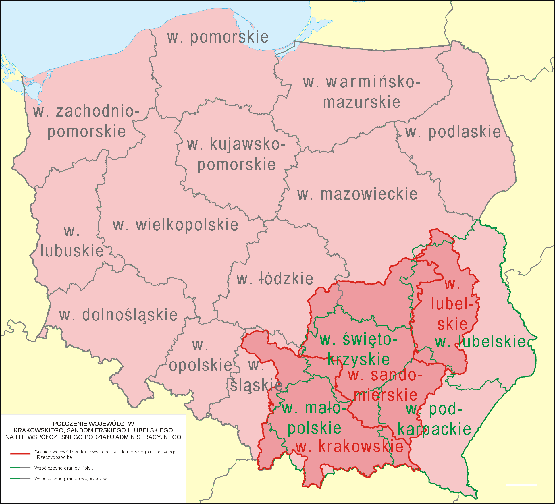 Położenie województw krakowskiego, sandomierskiego i lubelskiego I Rzeczypospolitej na tle współczesnego podziału administracyjnego